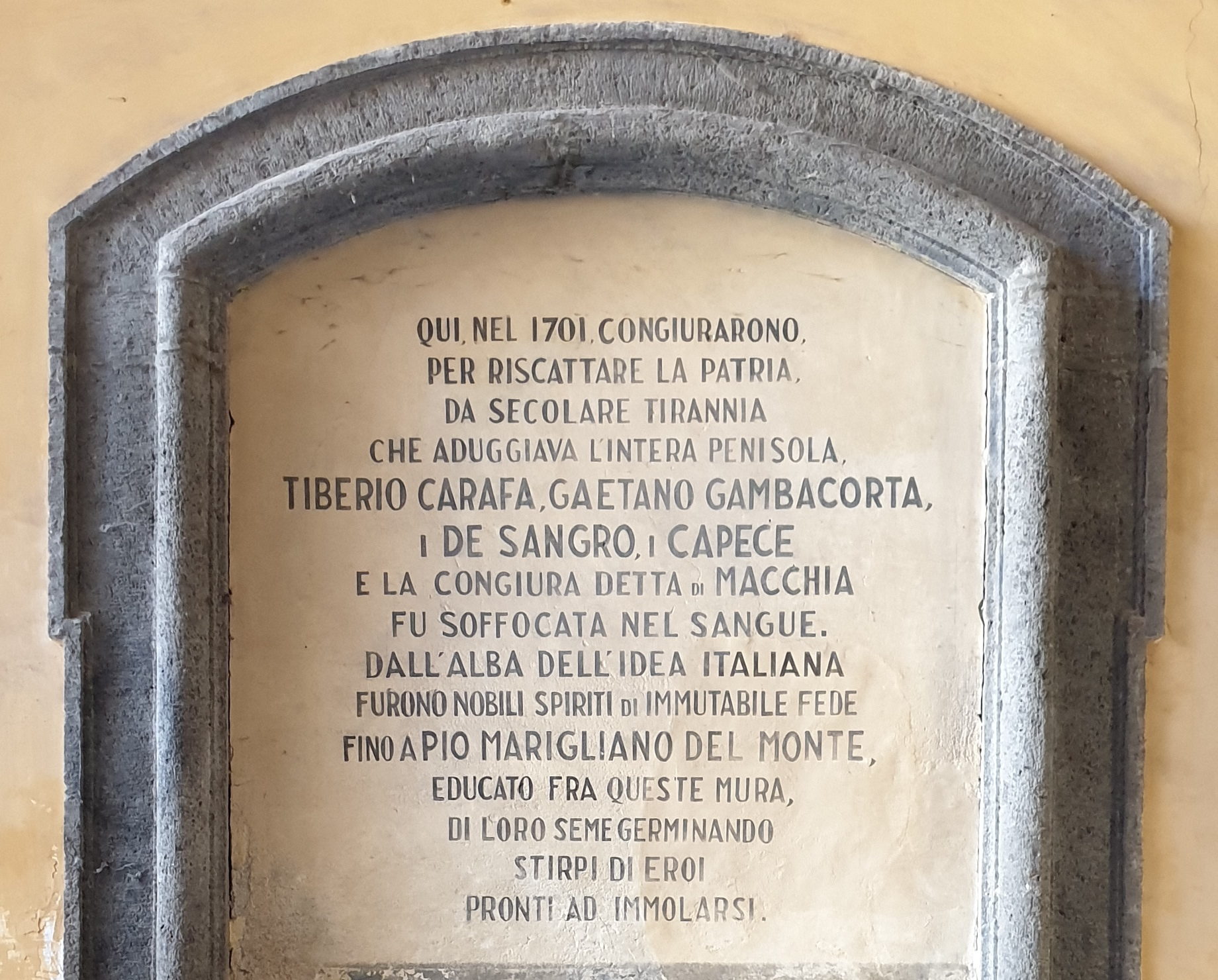 Iscrizione nell'atrio di Palazzo Marigliano, alla destra dell'ingresso, che ricorda la congiura di Macchia del 1701, ordita nell'edificio.